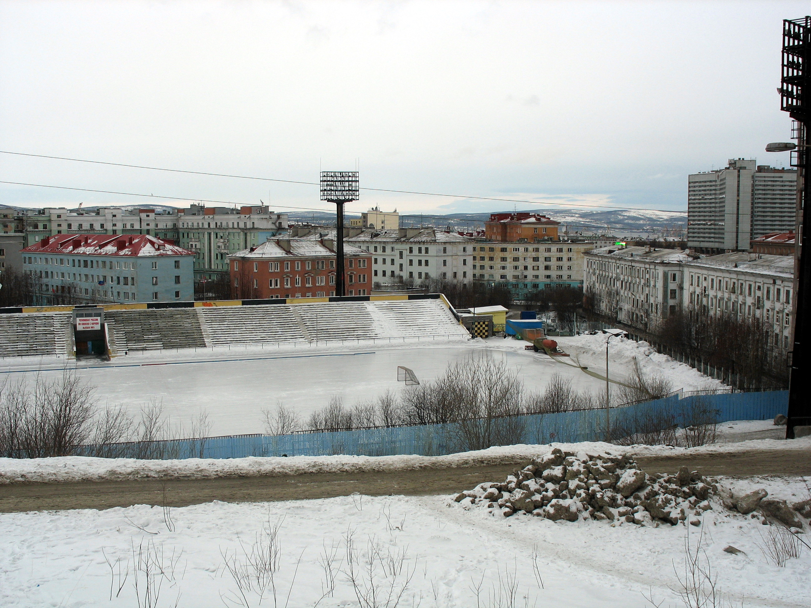 Стадион Строитель